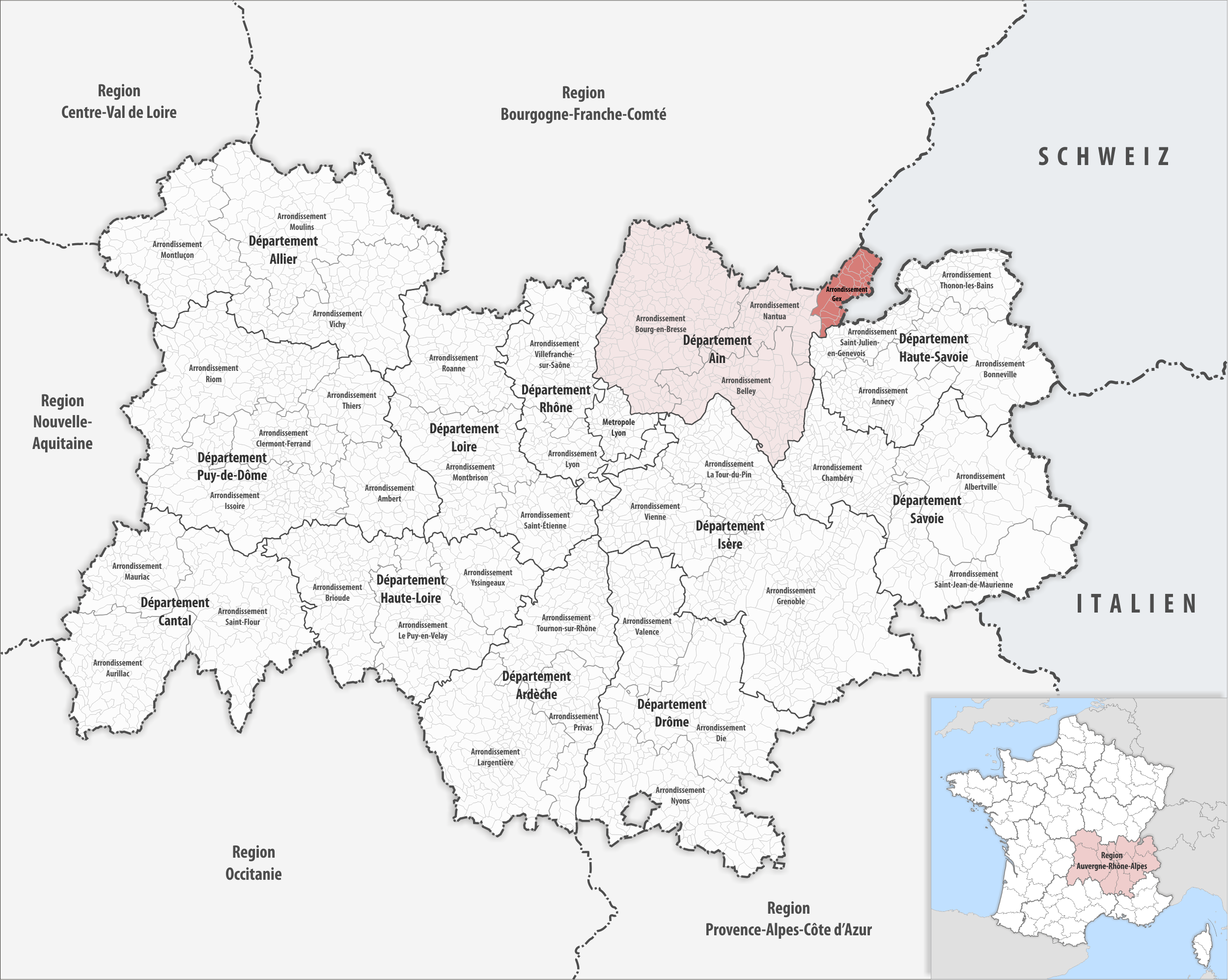 Lage des Arrondissements Gex